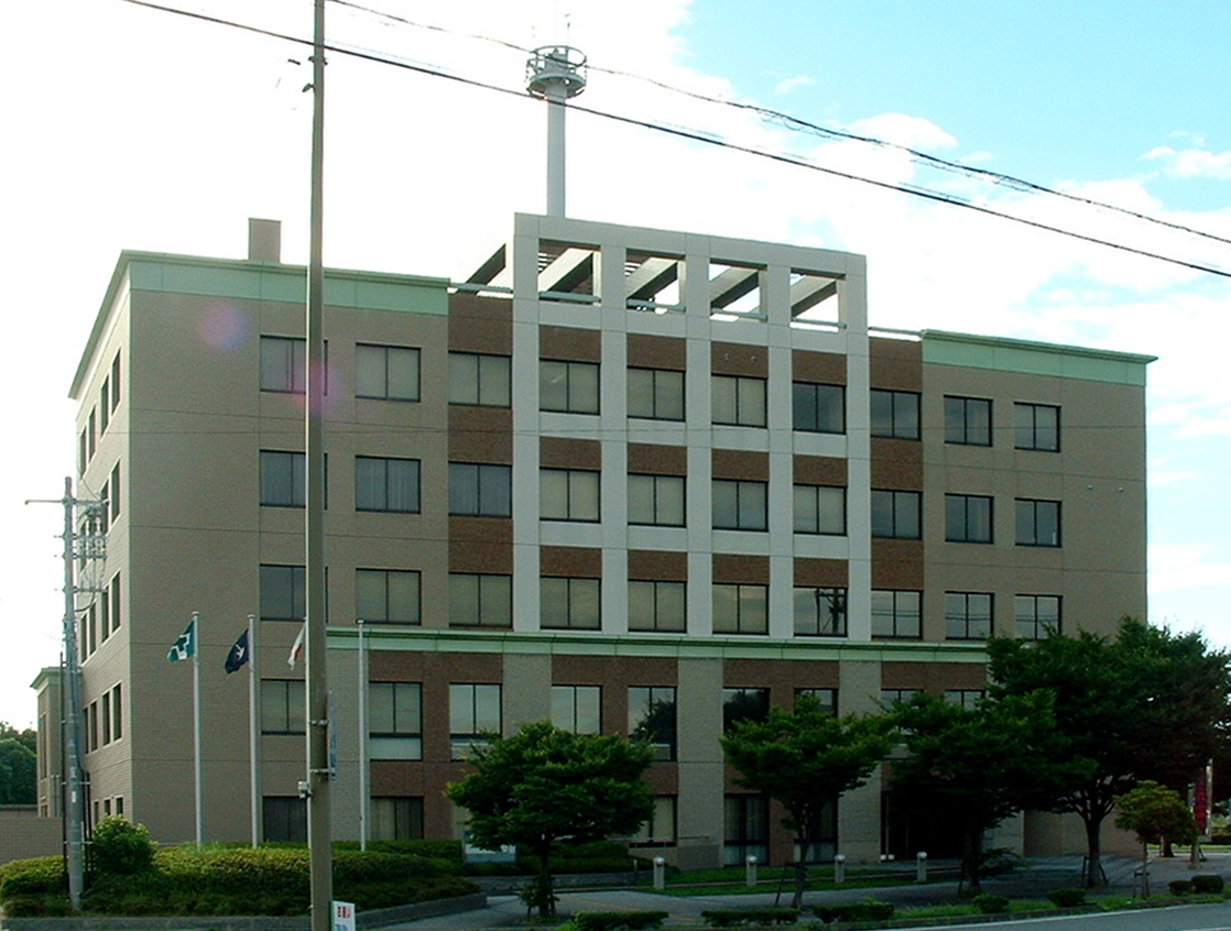 宇部地方合同庁舎。2010年7月18日撮影。 門司税関宇部税関支署、第七管区海上保安本部門司海上保安部宇部海上保安署、宇部労働基準監督署、広島検疫所宇部出張所（出張対応出張所）、山口地方法務局宇部支局